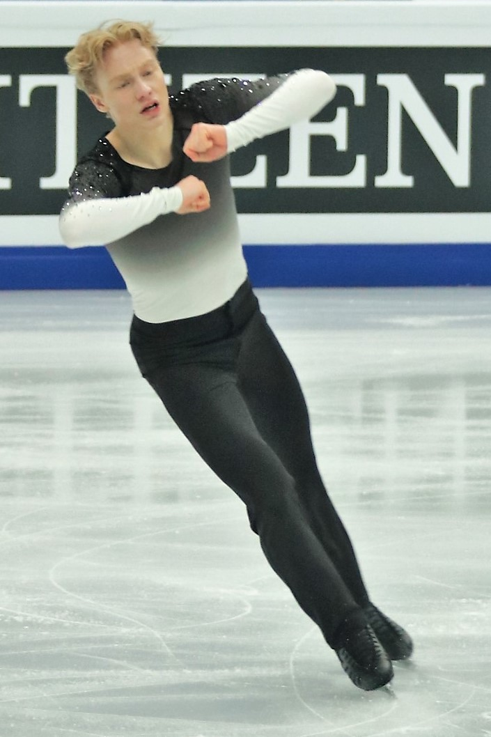 Sondre Oddvoll Bøe (Норвегия) на Чемпионате Европы по фигурному катанию 2018